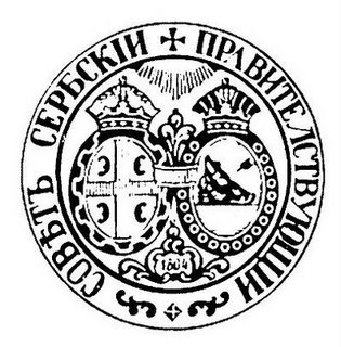 Печат Правитељствујушчег совјета сербског.